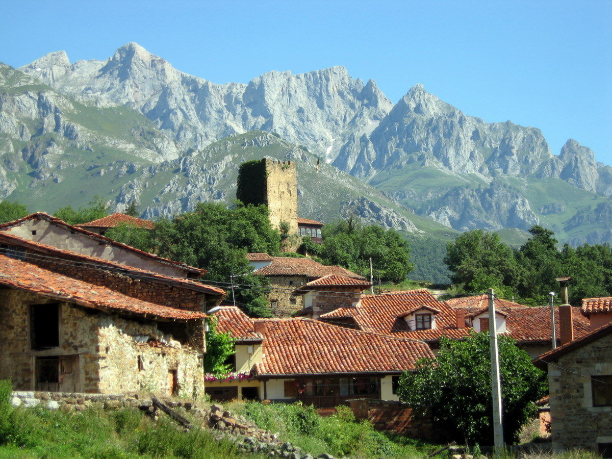 El pueblo Mogrovejo situado en el municipio de Camaleño, Cantabria (Spain). Al fondo la Torre de Pedro Ruiz de Mogrovejo, del siglo XIII